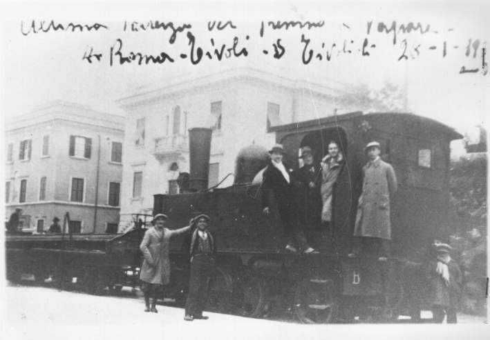 Ultime corse del tram Roma-Tivoli